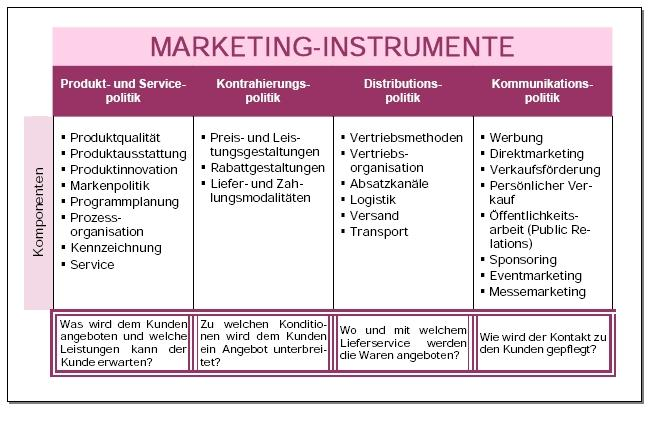 Übersicht der Marketing-Instrumente